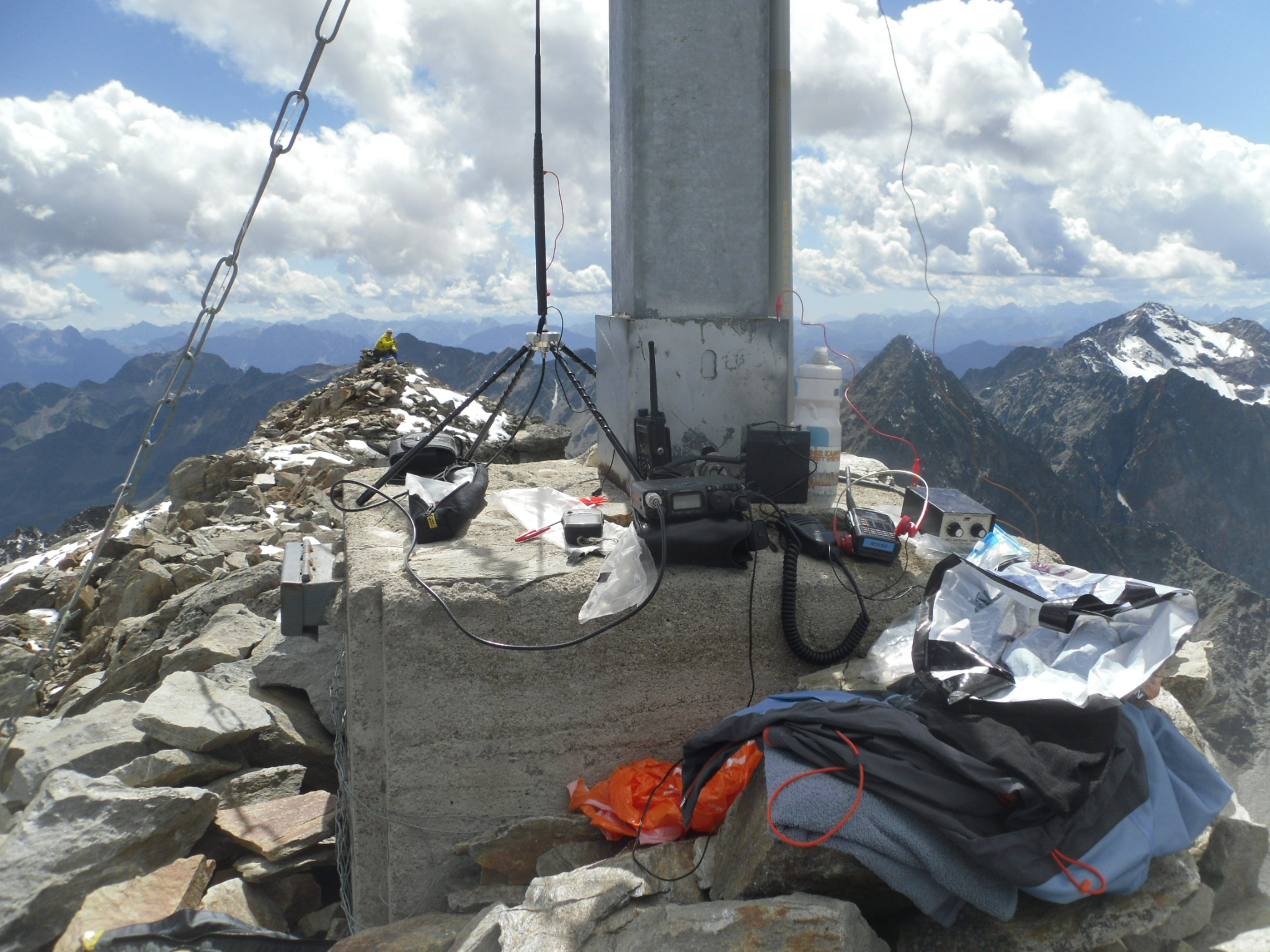 SOTA activation of the summit of Roter Knopf on HF and VHF/UHF.